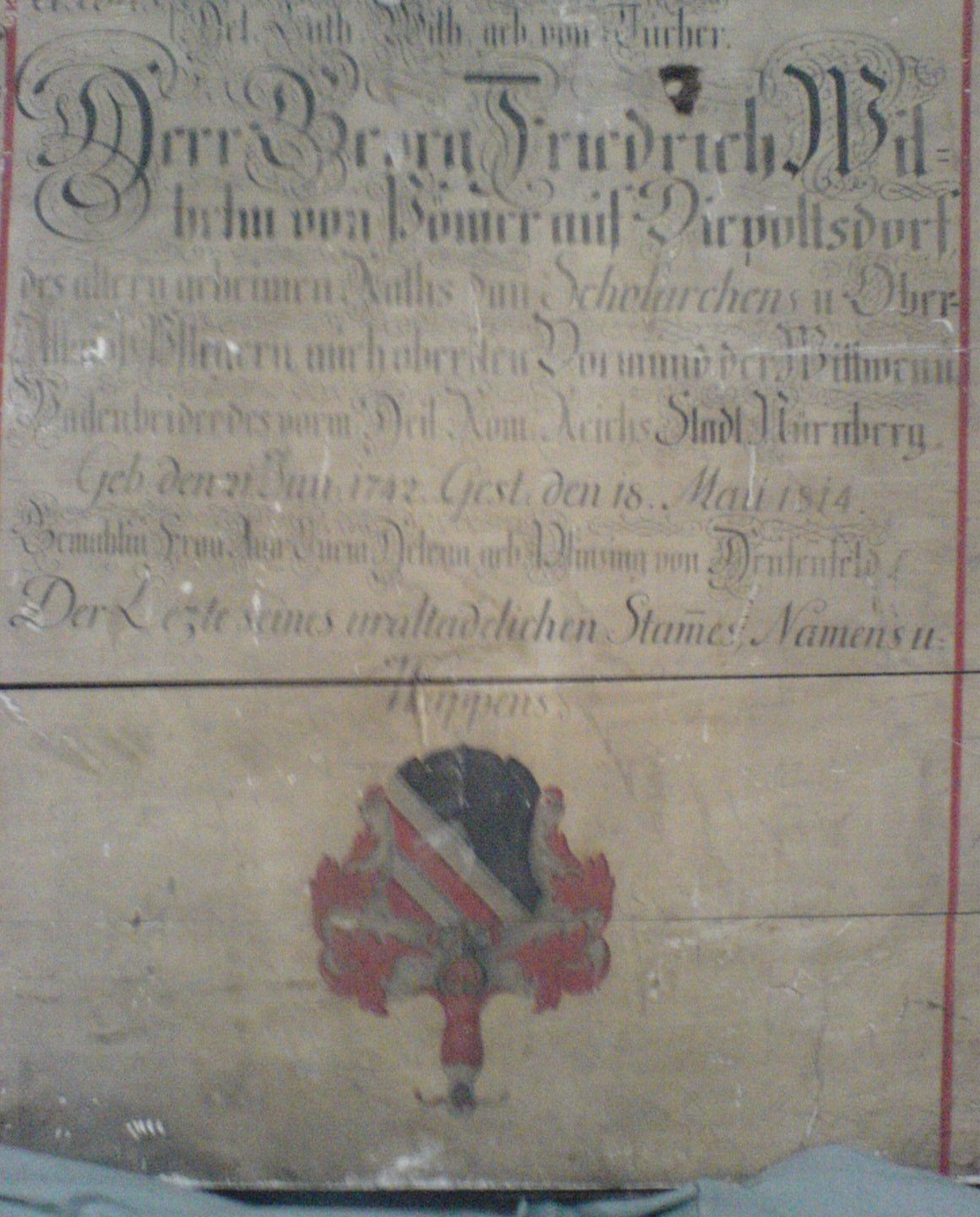 Pömer-Epitaph, Sebalduskirche Nürnberg